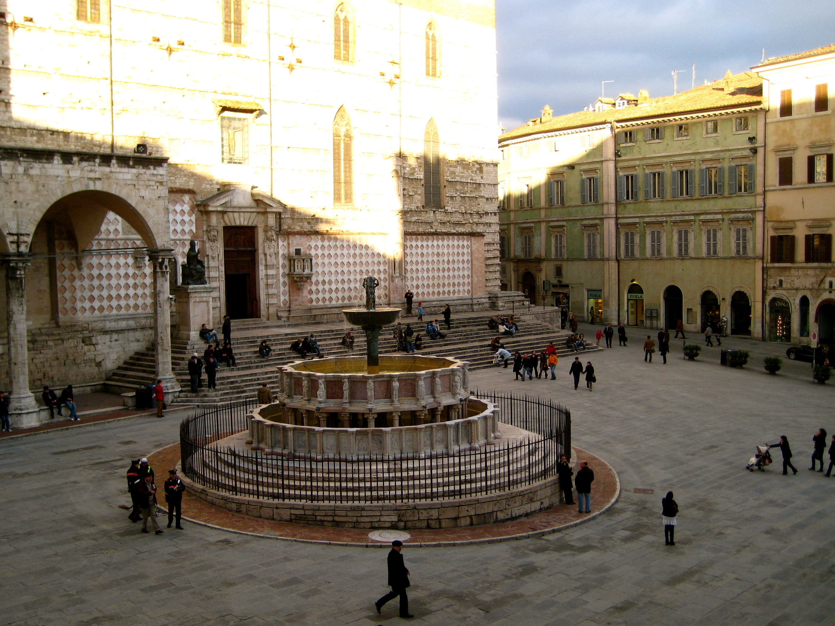 Piazza IV Novembre, Perugia, Italy.